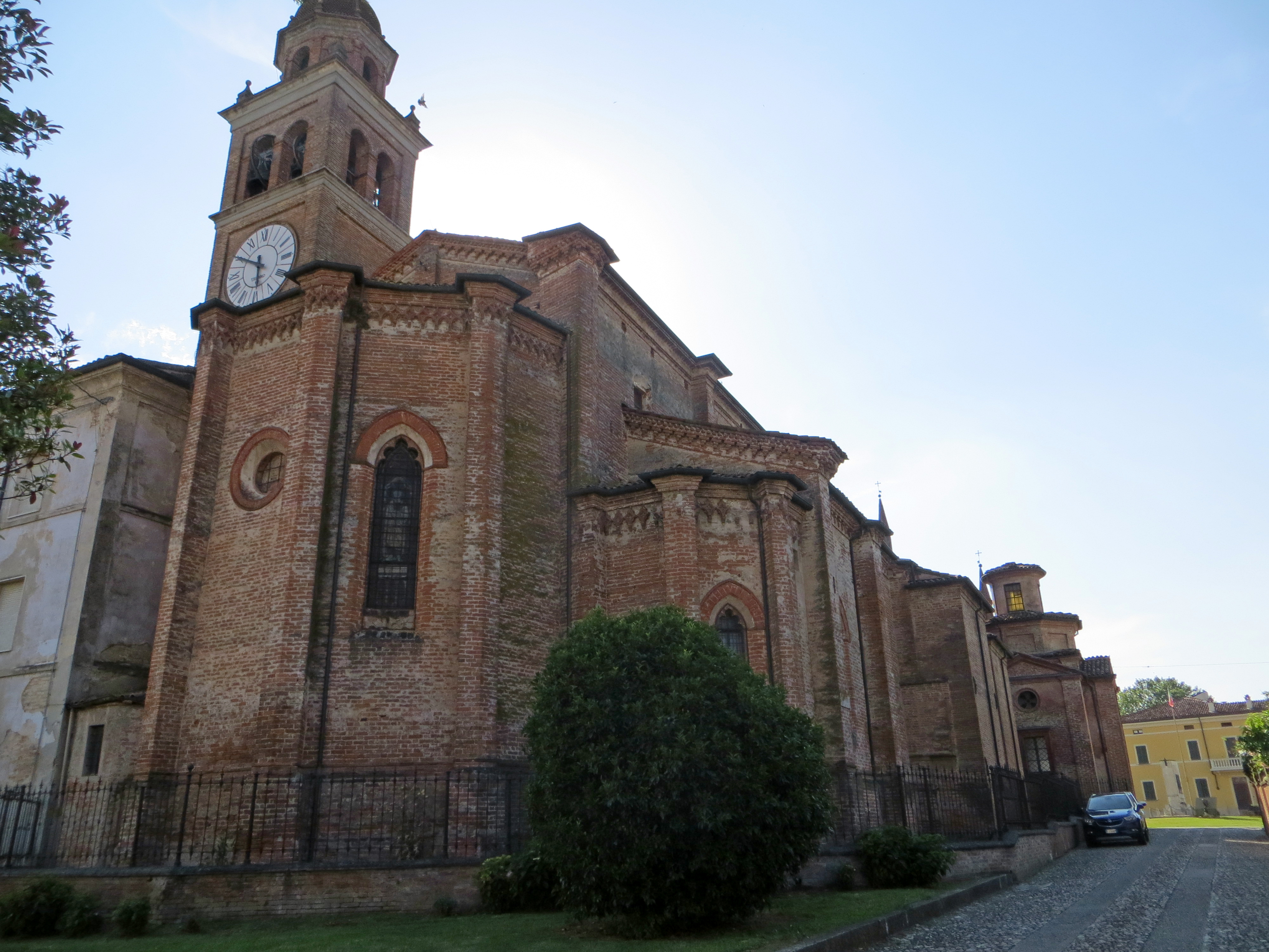 Chiesa dei Santi Gervasio e Protasio (Zibello) - abside e lato nord